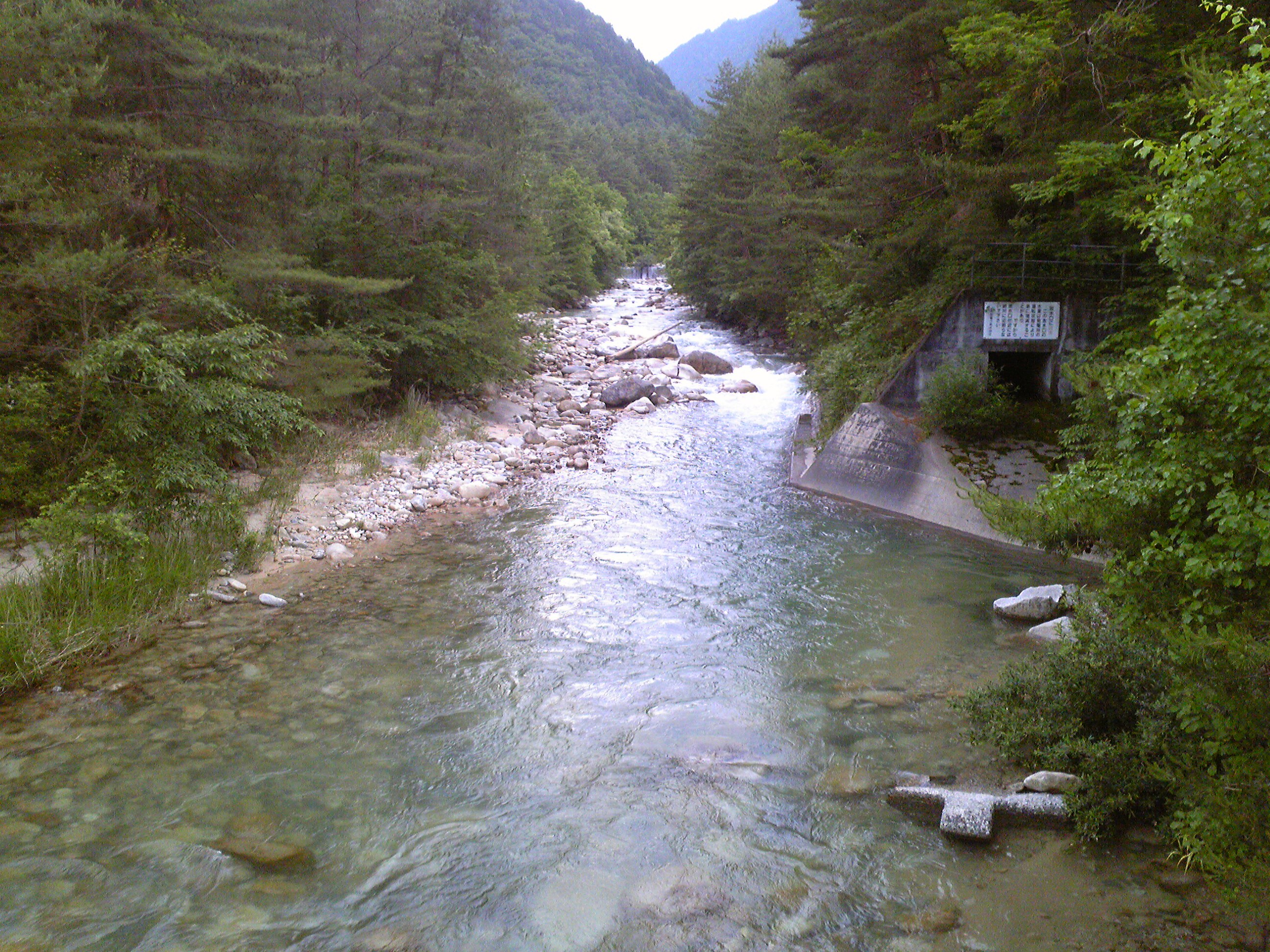 中房川。長野県安曇野市穂高有明、大王橋（だいおうばし）より上流方向。